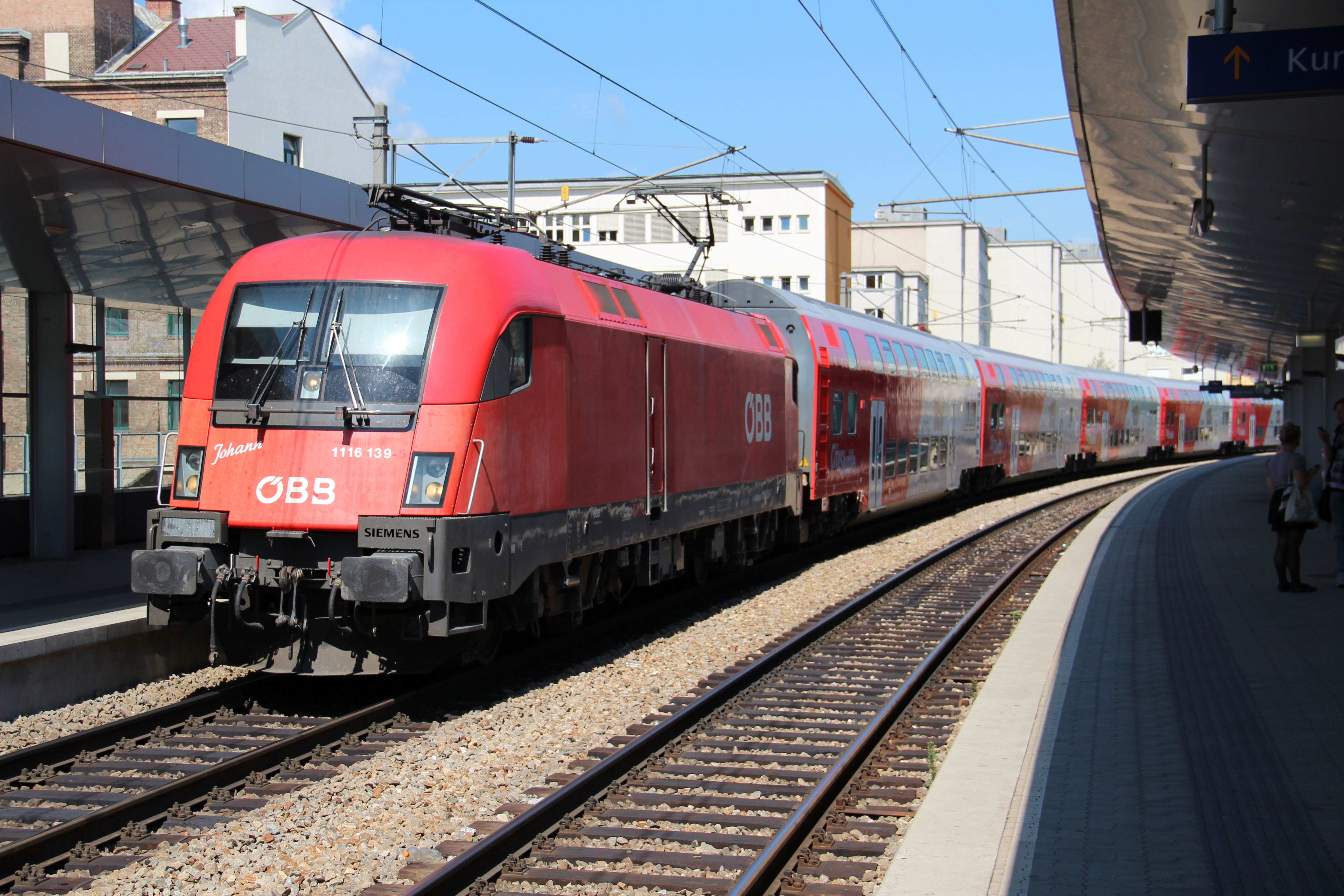 Die ÖBB 1116.139 "Johann" fährt hier mit einem Doppelstock-Wendezug in der Haltestelle Wien Traisengasse als Regionalzug von Bernhardsthal nach Payerbach-Reichenau ein.